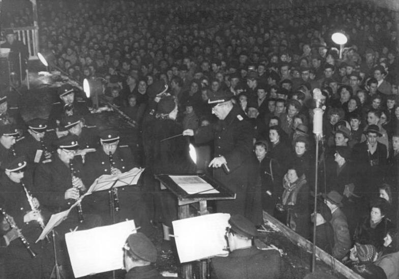 Berlin, Neujahrsmarkt, Konzert Zentralbild Quasch.-Krueger 4.1.1954 Str.-Ho. Neujahrsmarkt in Berlin eröffnet. Am 3.1.1954 wurde auf dem Marx-Engels-Platz der Berliner Neujahrsmarkt durch Oberbürgermeister Friedrich Ebert eröffnet. UBz: Das Orchester der Volkspolizei unter Leitung von Willy Kaufmann spielt zum Tanz auf.